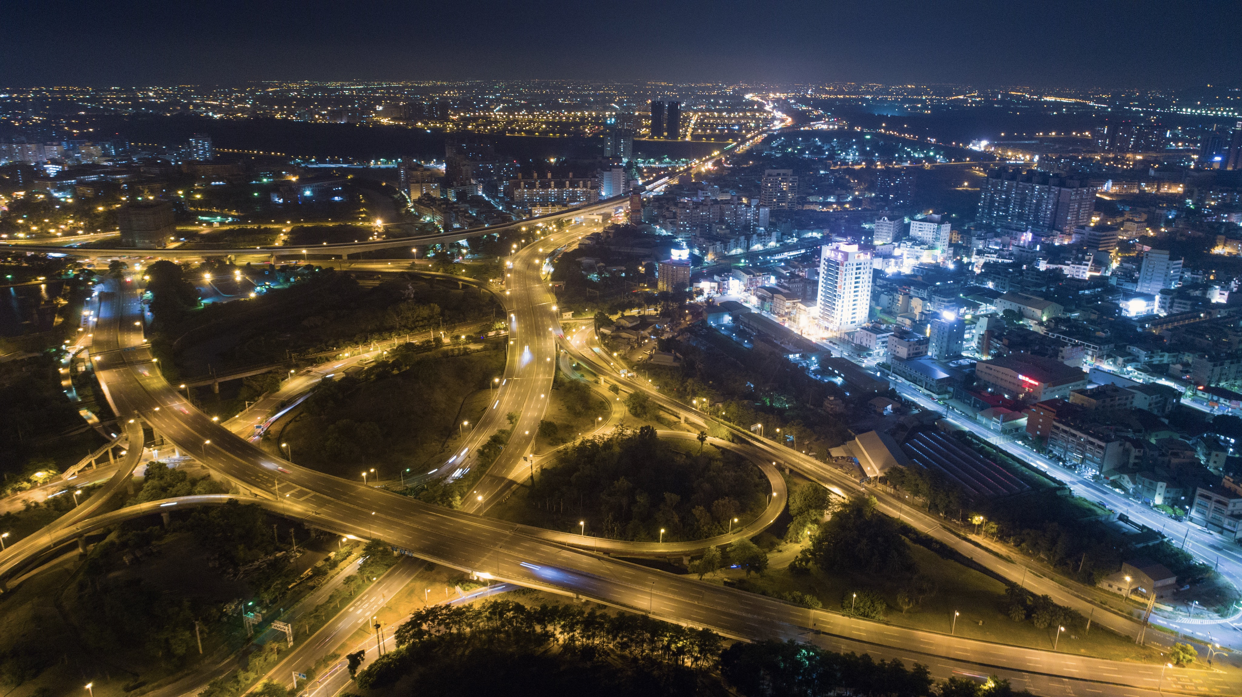 中文（台灣）: 夜間的楠梓陸橋與楠陽高架橋空拍實景